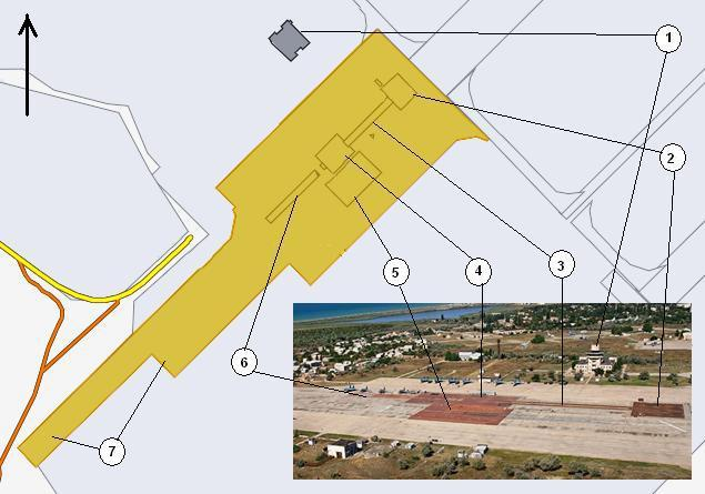 Схема наземного тренировочного комплекса корабельной авиации НИТКА (Крым, Саки-4).